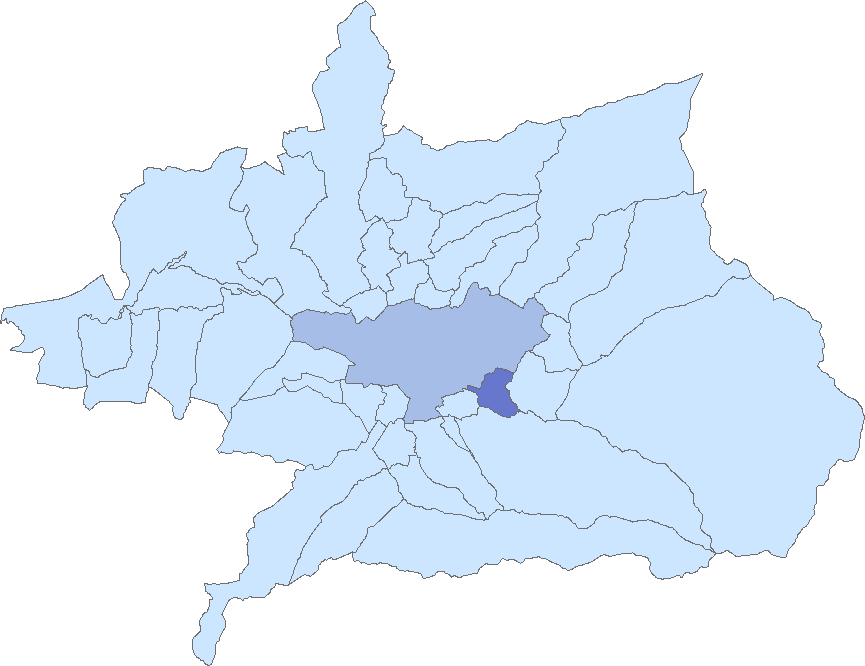 Situación del municipio de Cenes de la Vega respecto a la comarca de la Vega de Granada, en España.